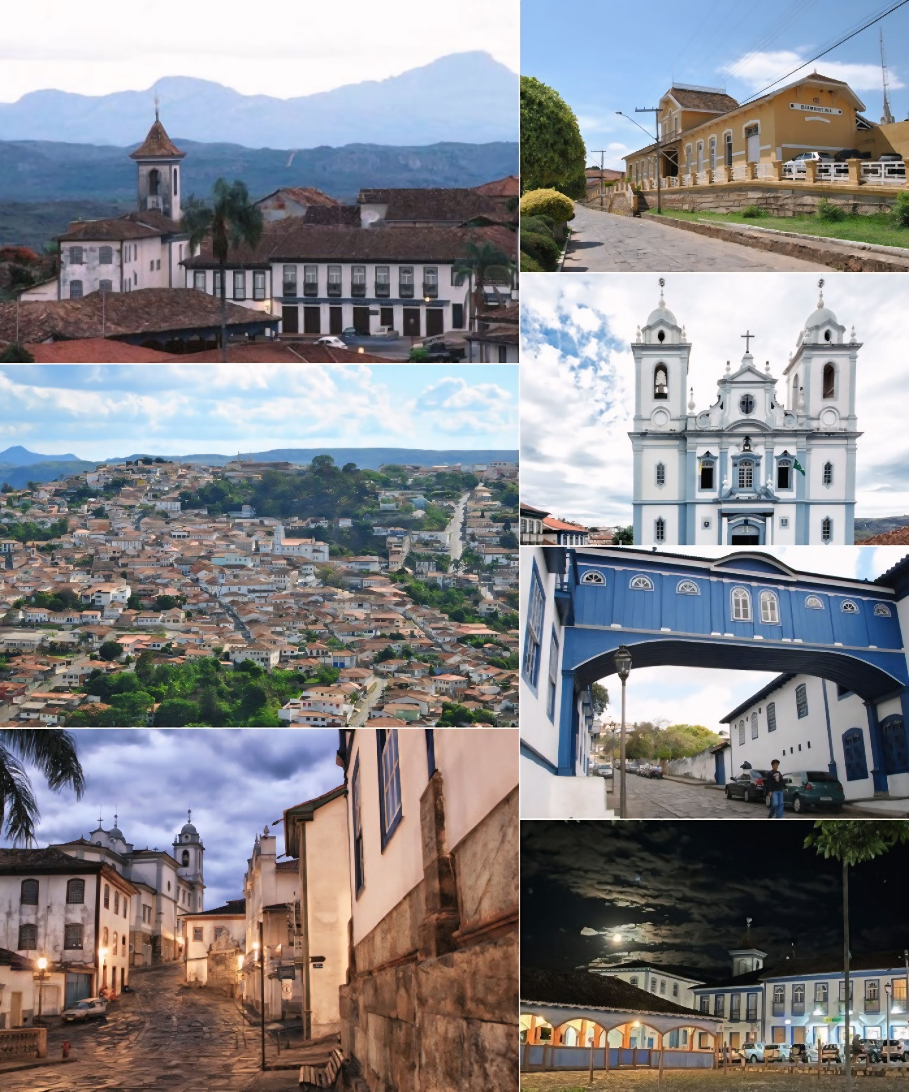 Montagem de fotos da cidade de Diamantina , Brasil . Do alto, em sentido horário: Vista do Centro Histórico de Diamantina ; Vista da cidade á partir do Cruzeiro ; Catedral Metropolitana de Diamantina ; Vista áerea do Residencial Jardim Imperial ; Rua Macau do Meio e Antiga Estação Ferroviária de Diamantina.